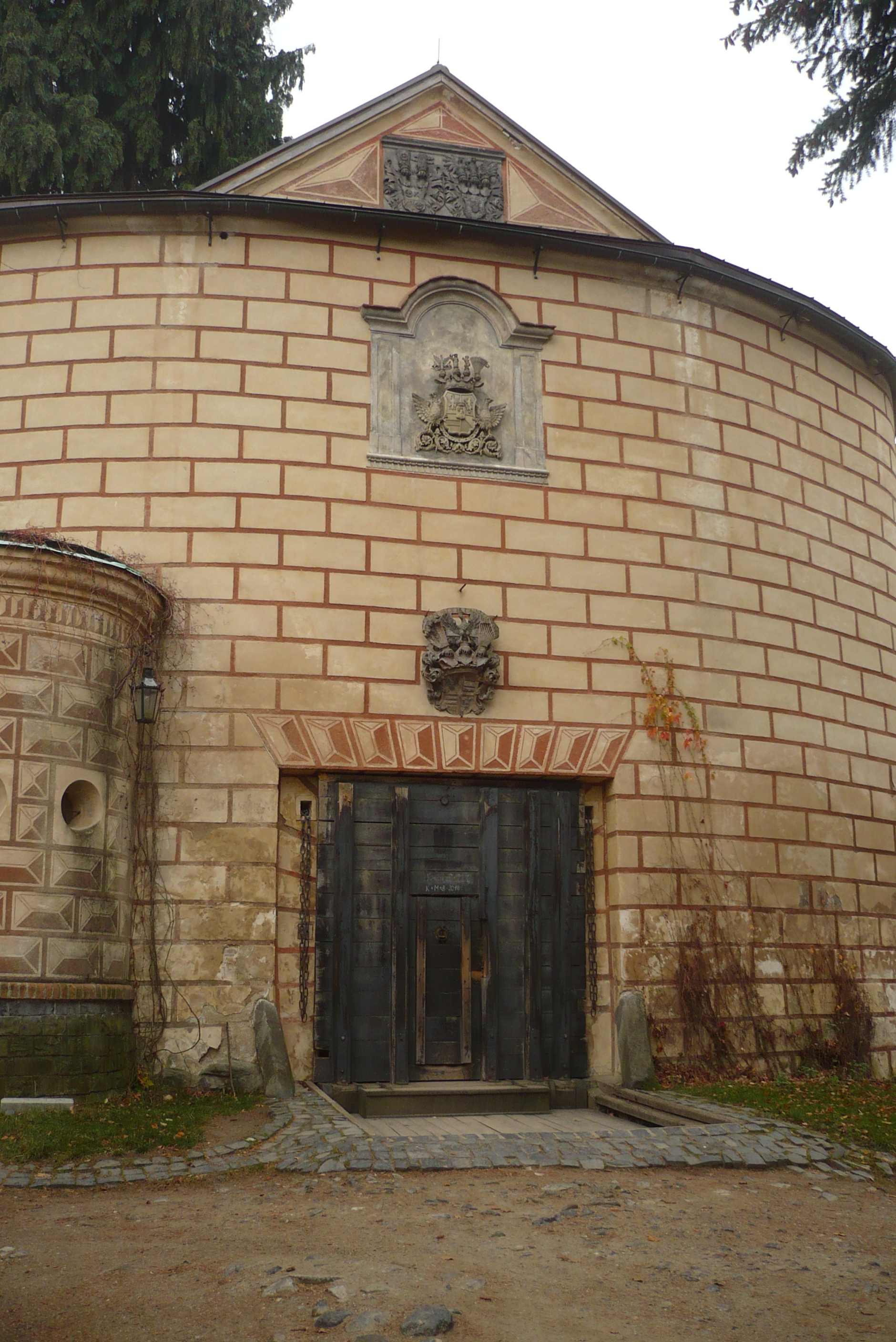 Frýdlant